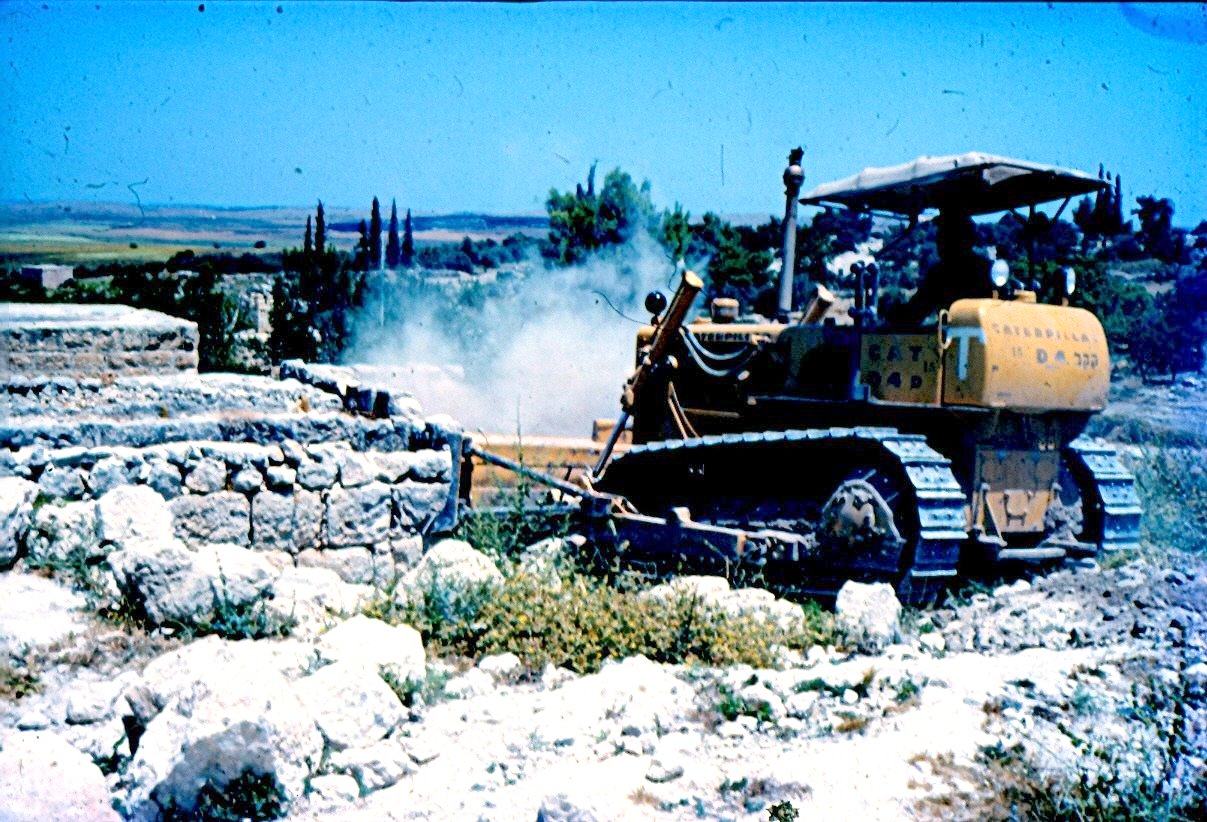 עמואס היה כפר ערבי ששכן עד שנת 1967 באזור מובלעת לטרון. הכפר נכבש במלחמת ששת הימים תושביו פונו והכפר נהרס על ידי צה"ל.